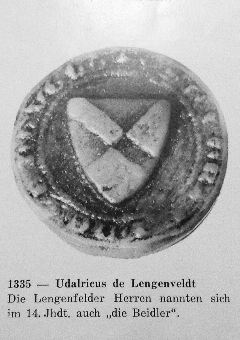 Siegel des Ulrich von Lengenfeld, der im 14. Jahrhundert Schönficht zu Lehen hat